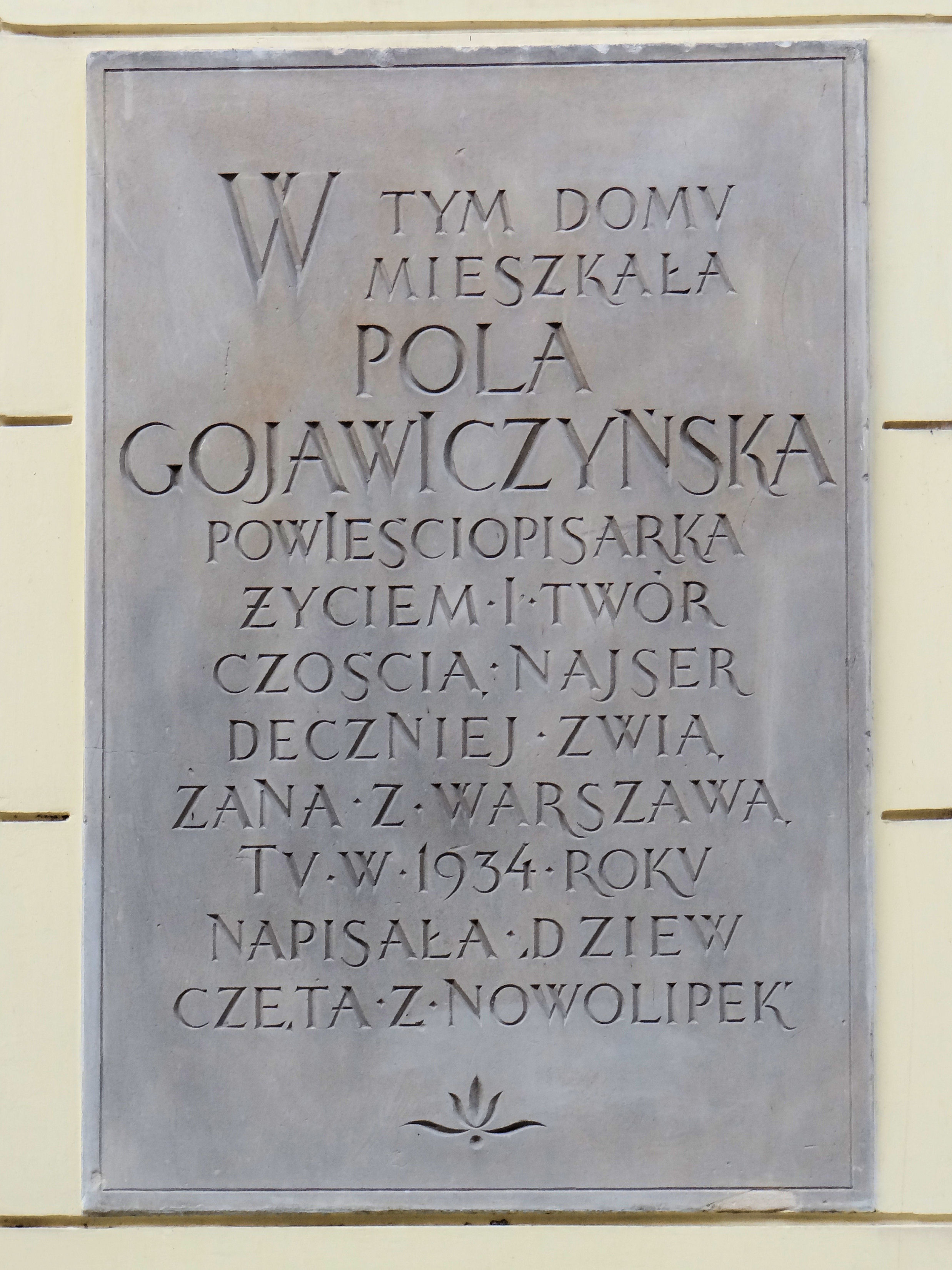 Kamienica z XVIII-XIX, po wojnie odbudowana w 1959 zlokalizowana przy ul. Brzozowej 6/8. Mieszkała w niej Pola Gojawiczyńska - pisarka także pisząca o Warszawie.